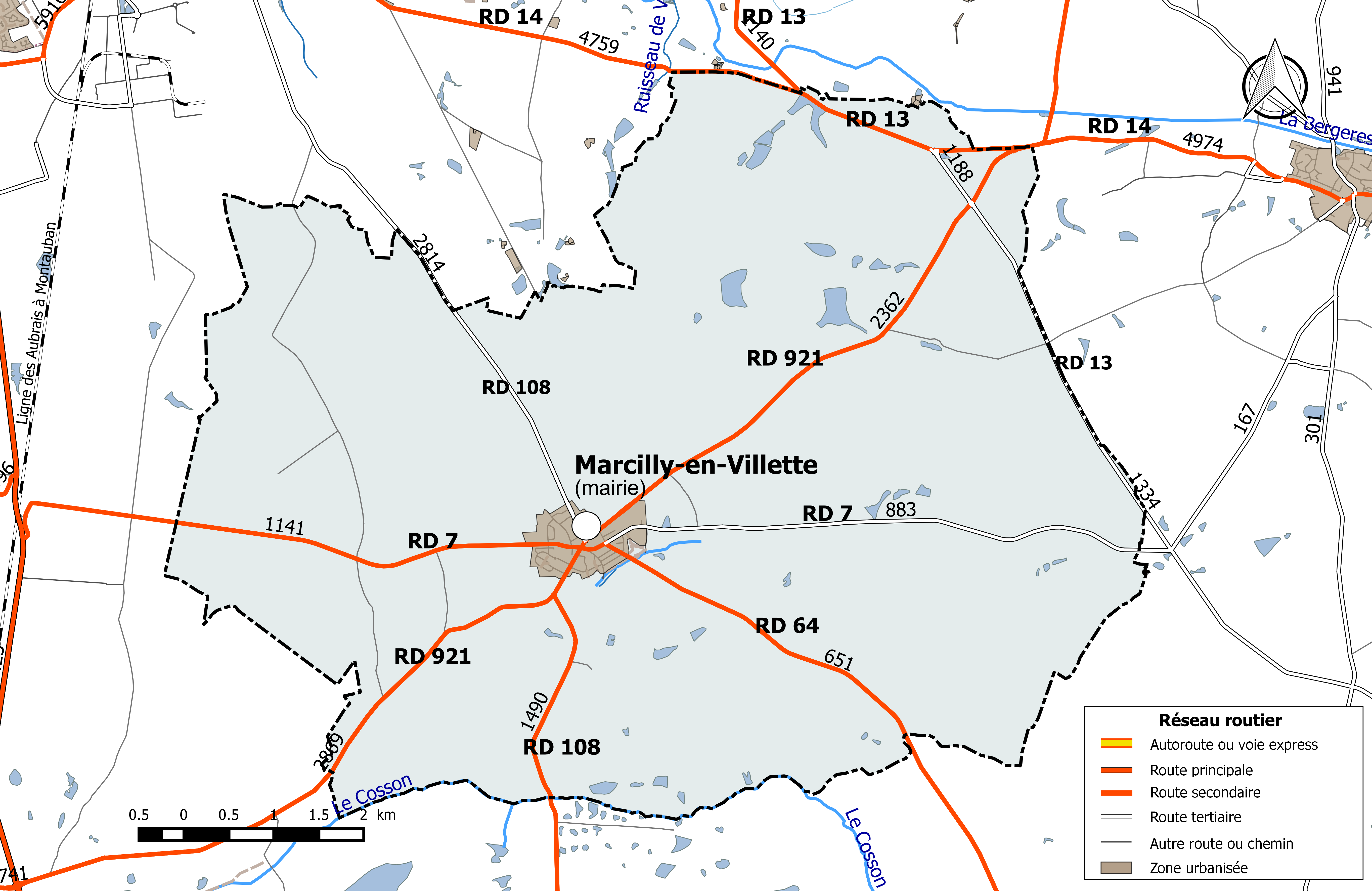 Carte du réseau routier de la commune de Marcilly-en-Villette.